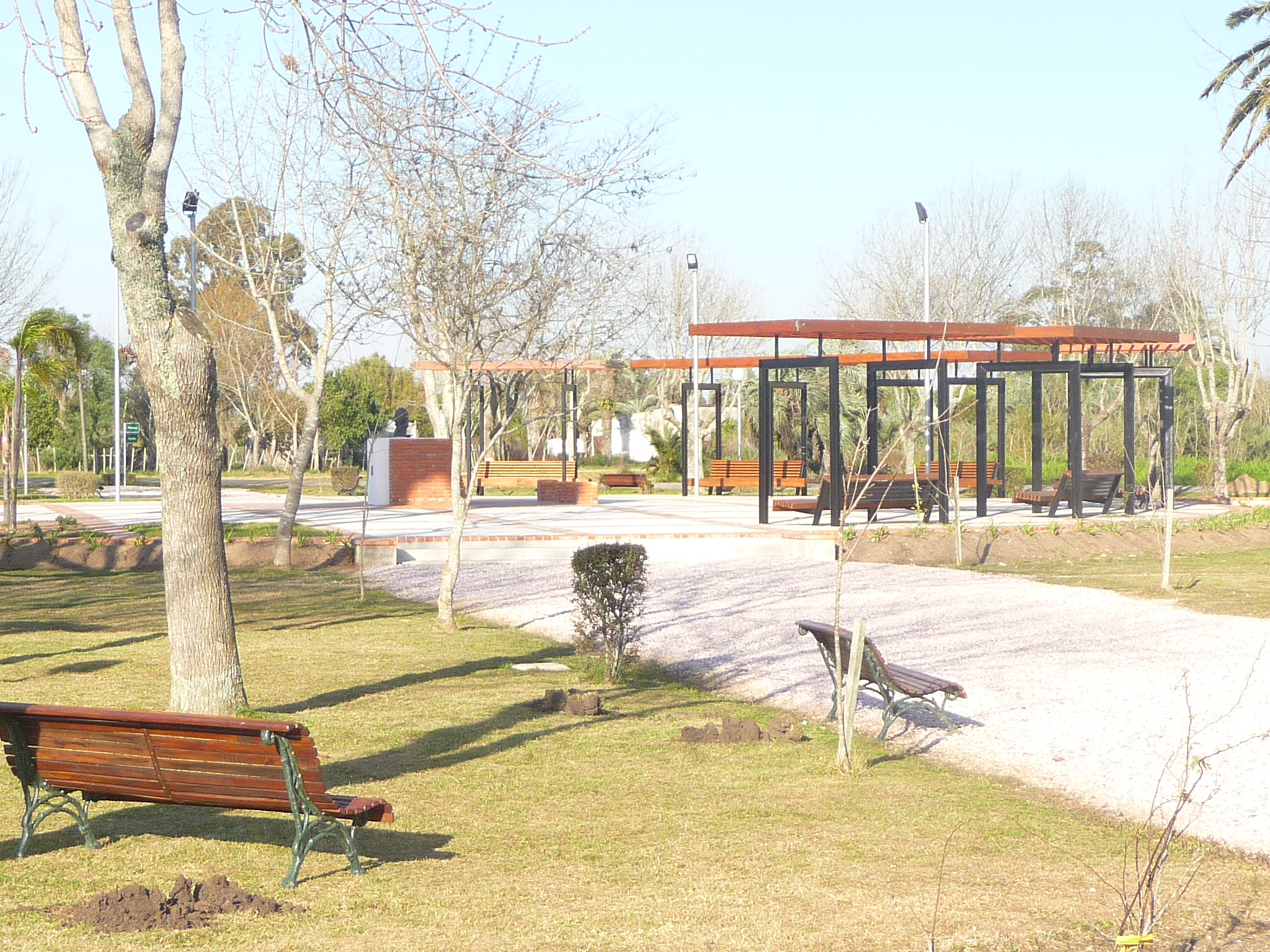 La plaza